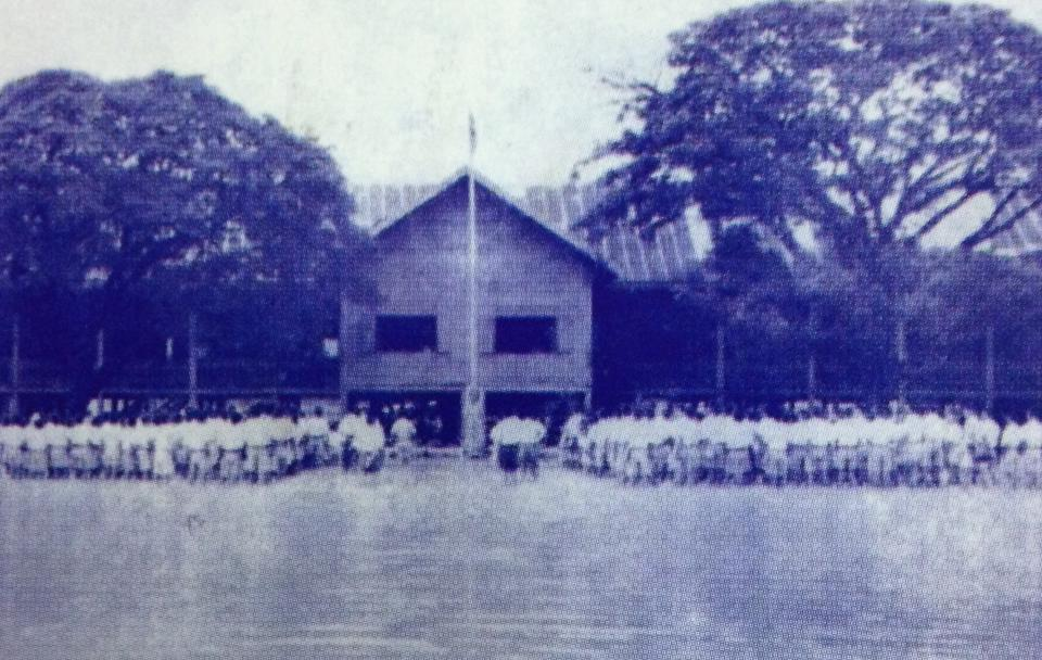 อาคารเรียนโรงเรียนชัยภูมิภักดีชุมพล ปี 2447 ภาพโดย ศูนย์เรียนรู้ไทยภัณฑ์ โรงเรียนชัยภูมิภักดีชุมพล